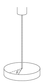 Torsion pendulum. 2006